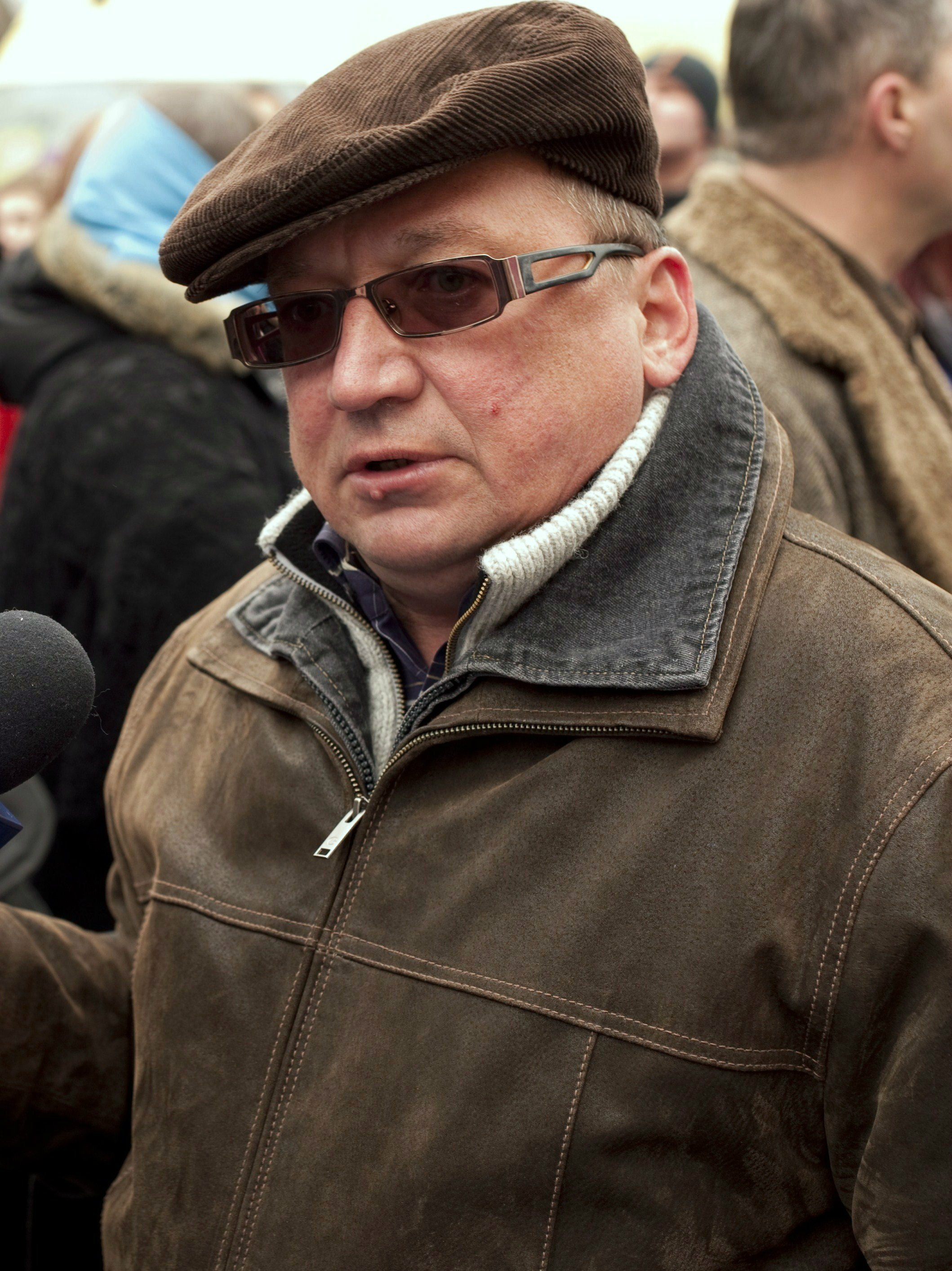 Lewicowy polityk Piotr Gadzinowski na Manifie w Warszawie, w 2009. Camera: Nikon D700 License on Flickr (2011-03-07): CC-BY-2.0 Flickr tags: D700, manifa, Nikon